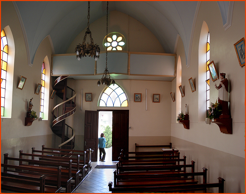 Interior da Capela de Santo Antônio da Linha 80, interior de Flores da Cunha, Rio Grande do Sul, Brasil.